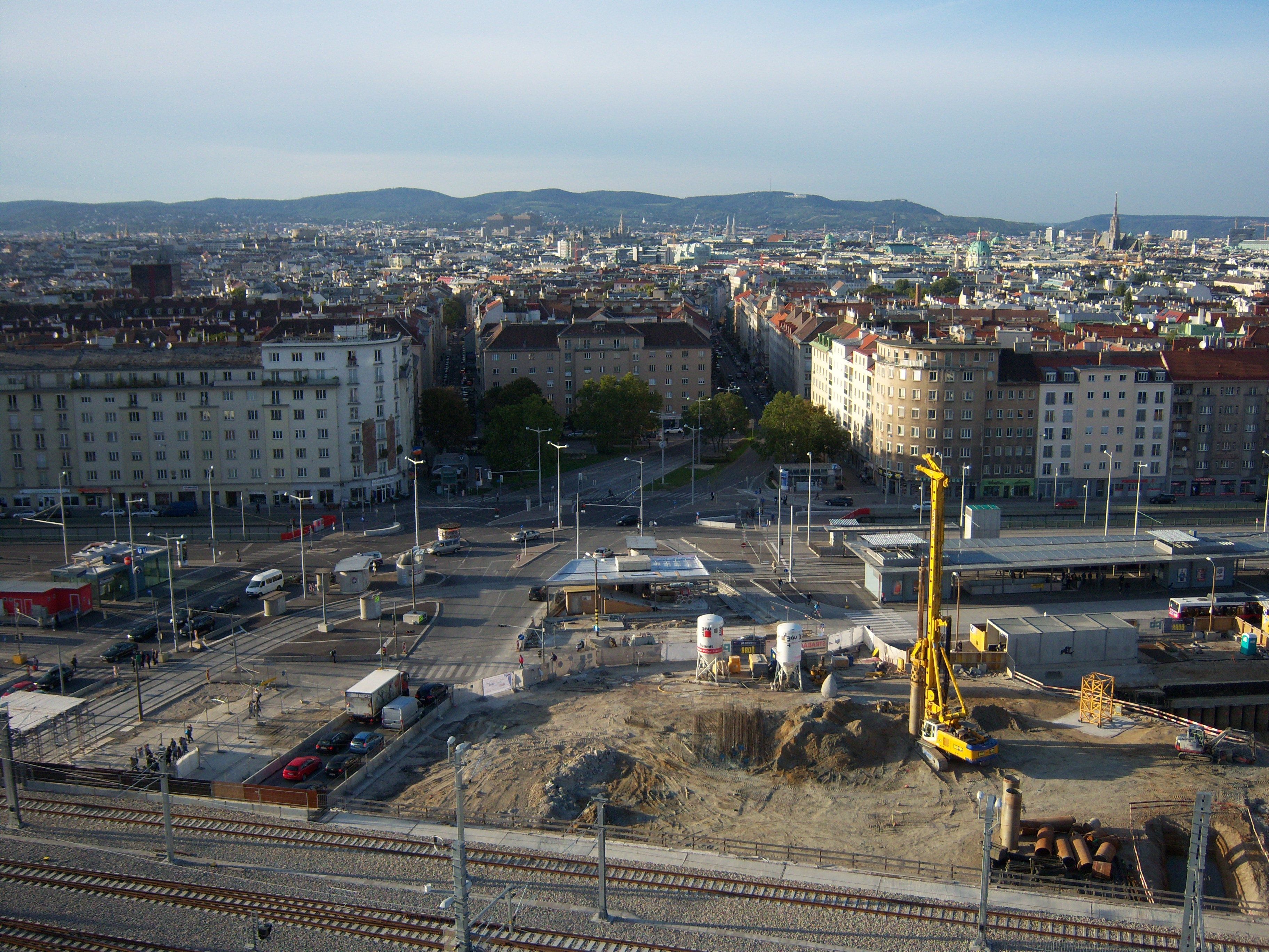 Blick vom Aussichtsturm "Bahnorama" auf die Baustelle Hauptbahnhof am Südtiroler Platz